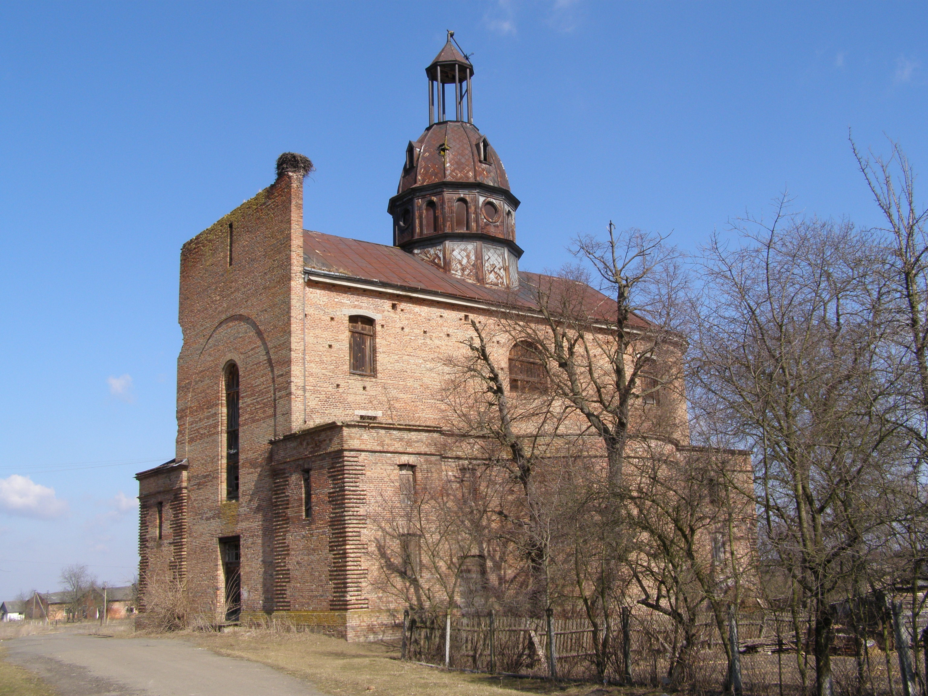 Фото католицького храму в містечку Щуровичі